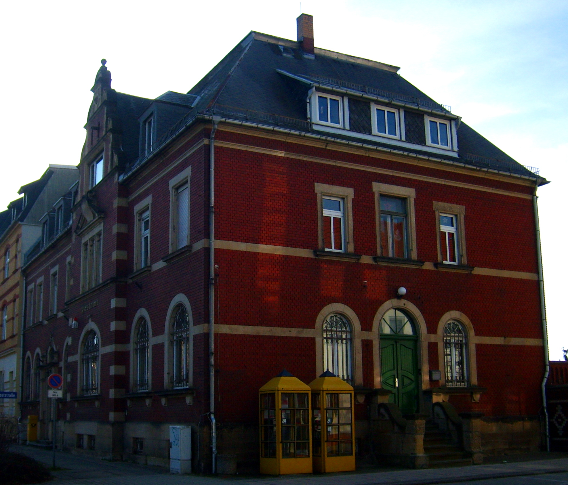 Das ehemalige Kaiserliche Postamt in Elsterwerda